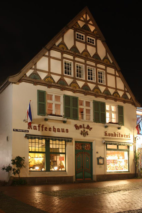 Café Heldt im heutigen Erhaltungszustand.